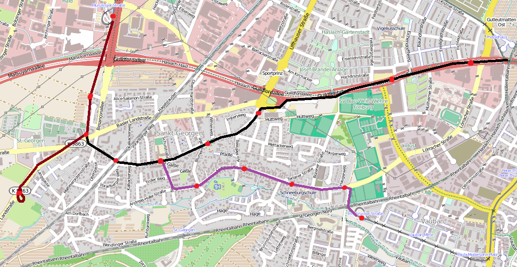 Geplante Anbindung St. Georgens an das Freiburger Straßenbahnnetz Zeichenerklärung: braun: 1. Ausbaustufe schwarz/Lila: 2 Ausbaustufe